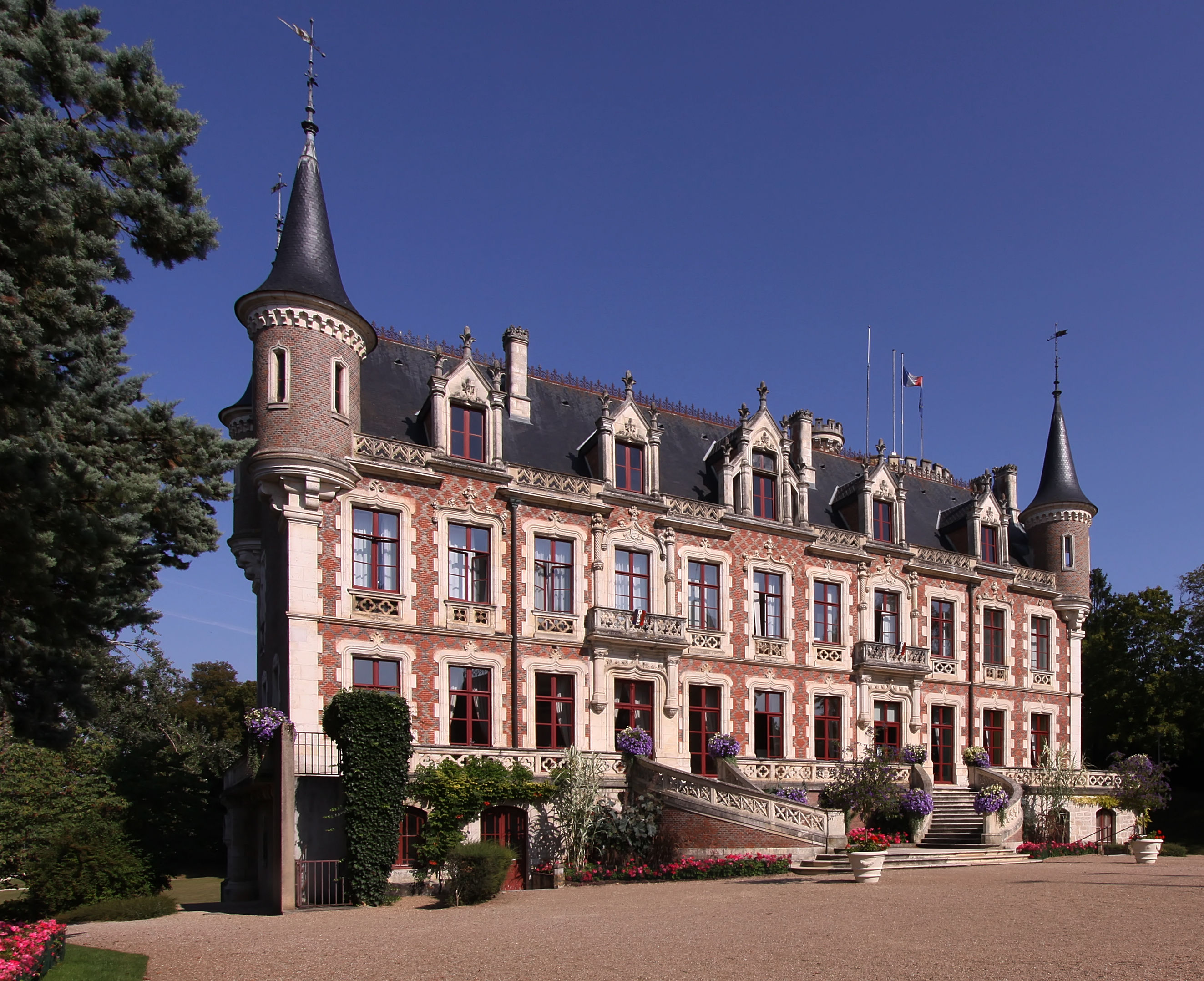 Schloss Saint-Florent-sur-Cher, Rathaus der Stadt Saint-Florent-sur-Cher im französischen Département Cher